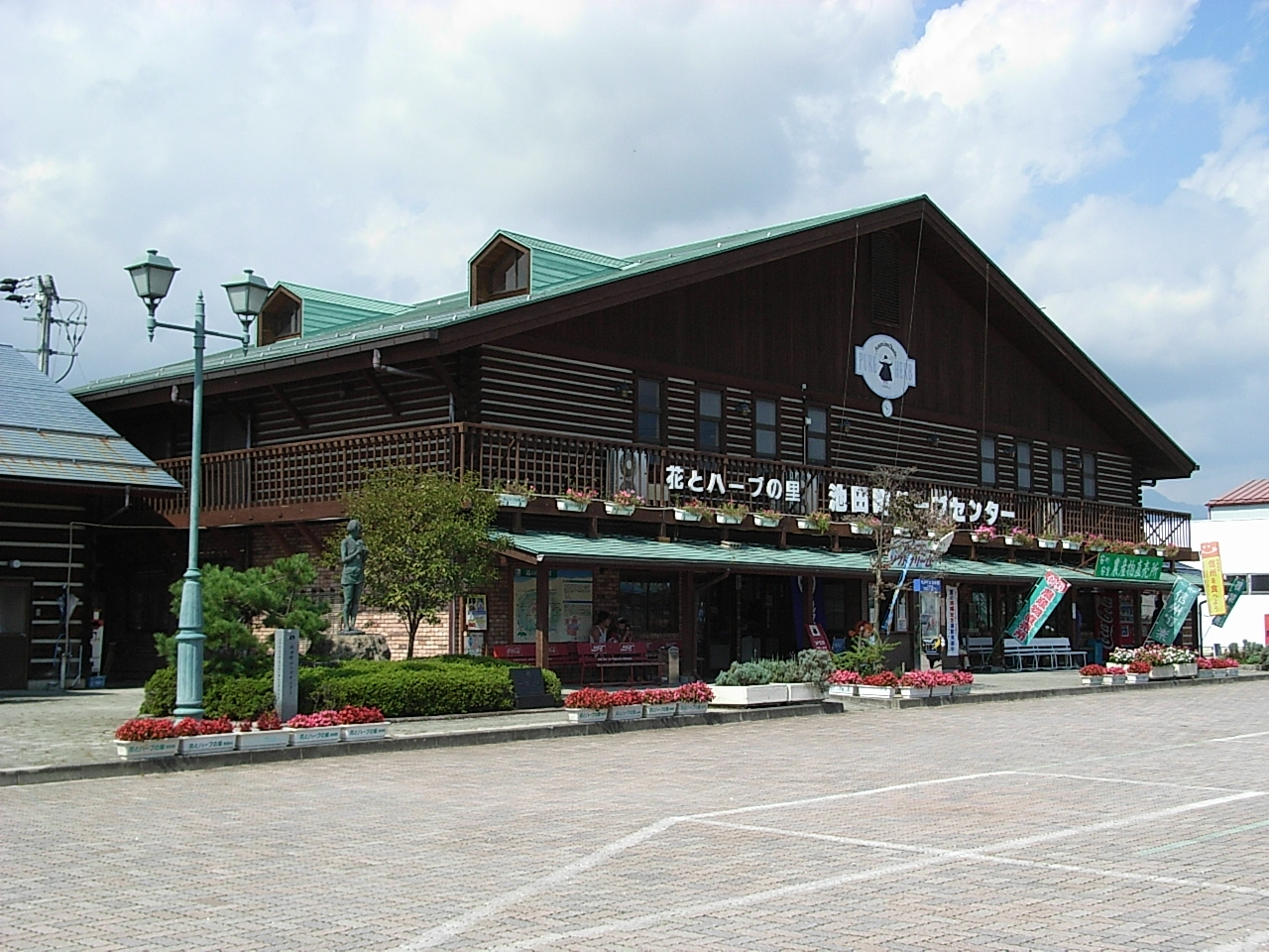 Michinoeki Ikeda (Nagano) (道の駅池田)